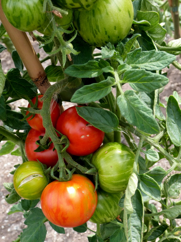 tomato cultivar